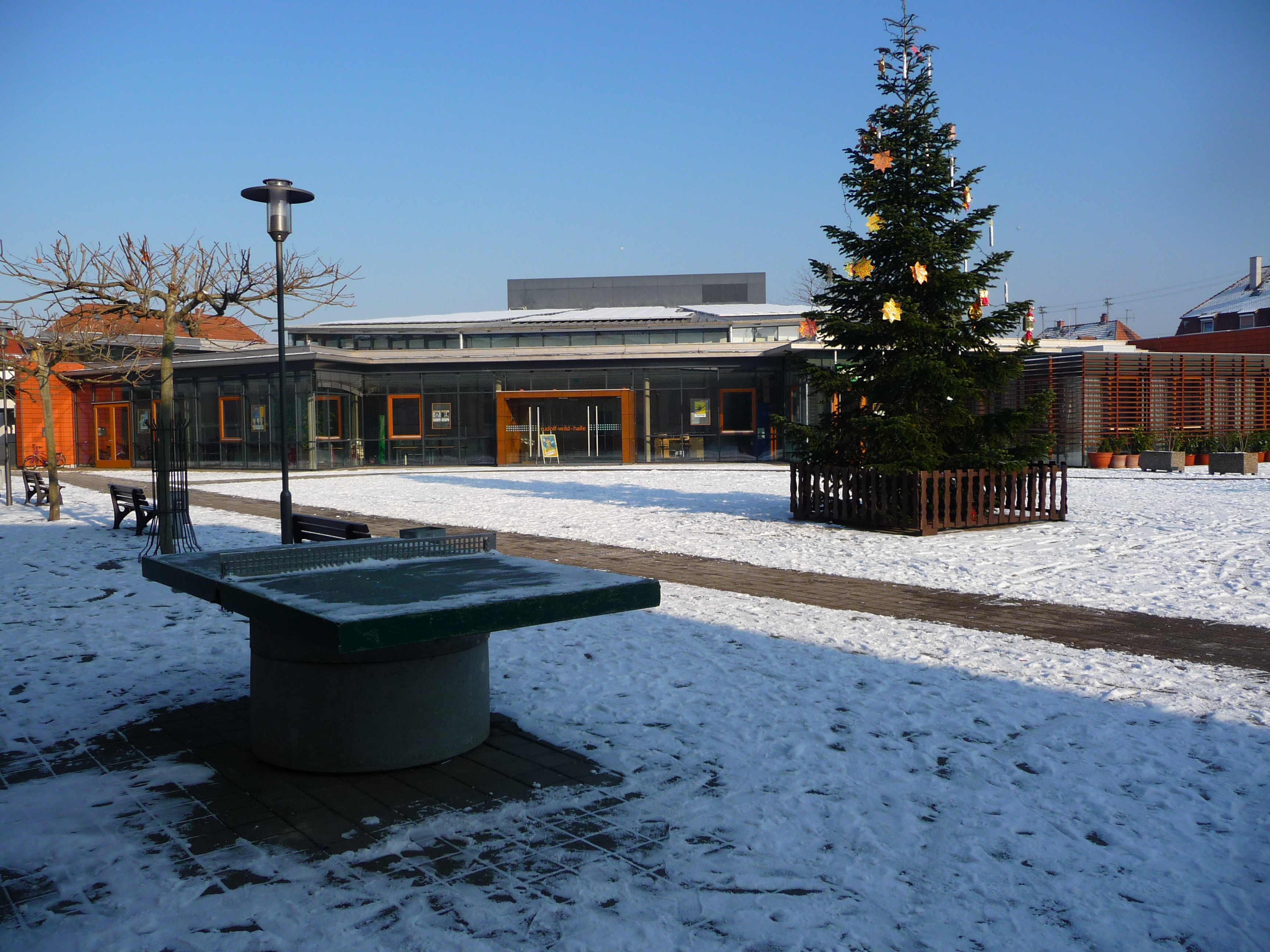 Eppelheim - Blick auf Rudolf-Wild-Halle